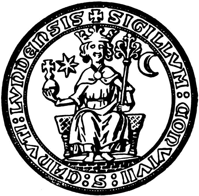 Sankt Knuts Gilles i Lund sigill